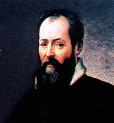 Portrait recadré de Giorgio Vasari